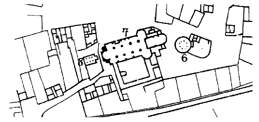 St. Gangolf (8), Bonner Münster (7), St. Martin (6)